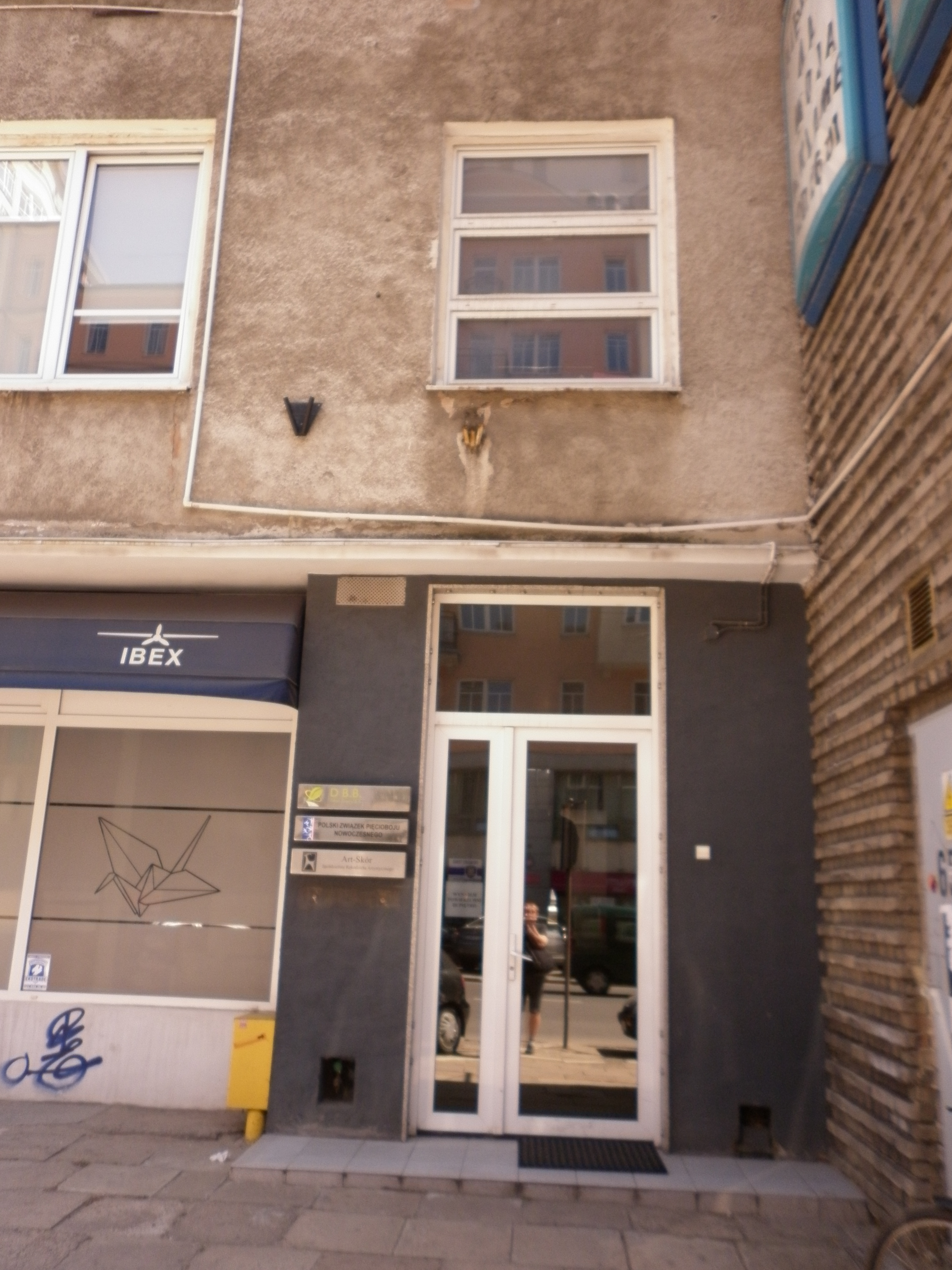 Siedziba Polskiego Związku Pięcioboju Nowoczesnego